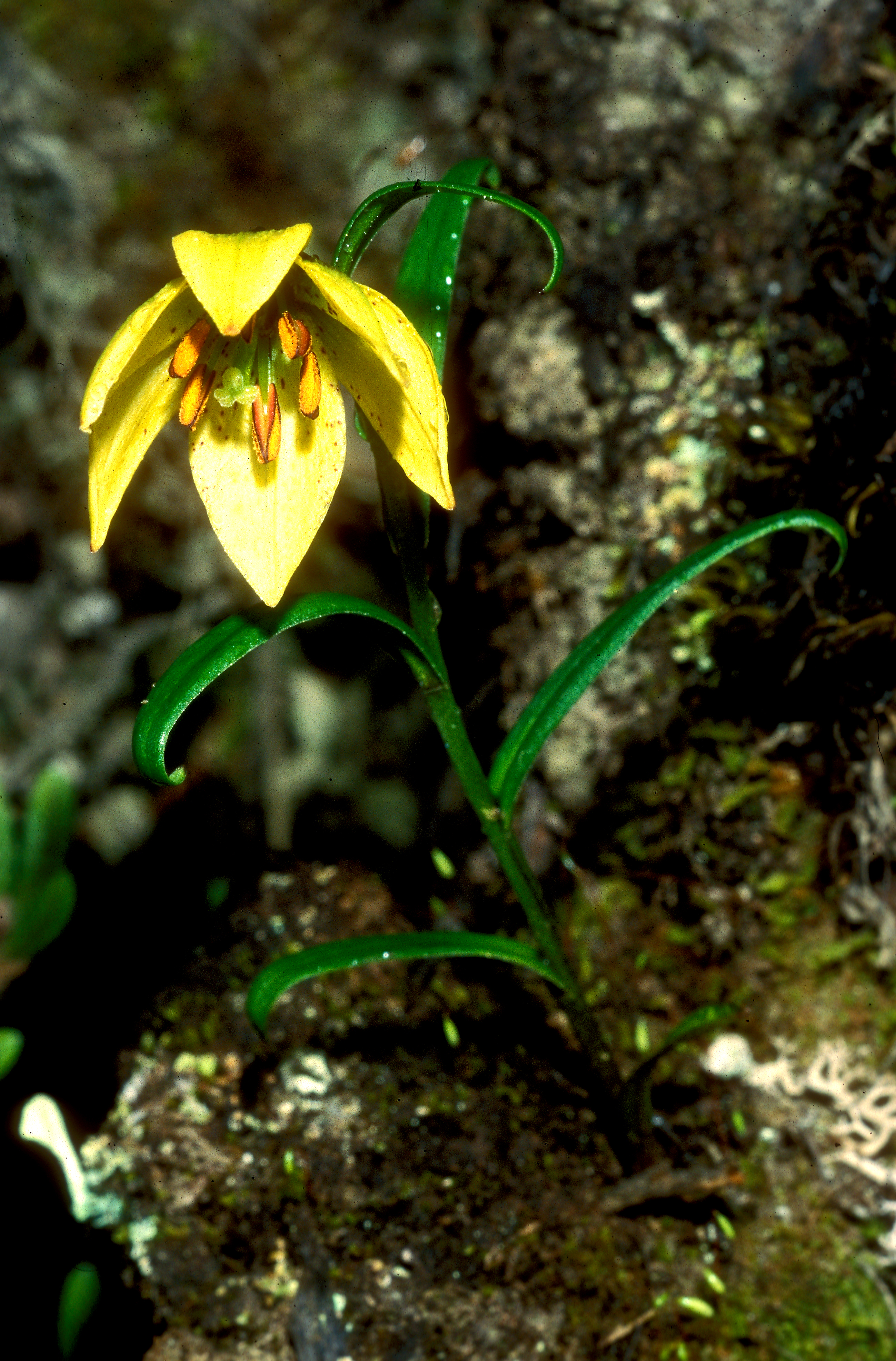 Lilium nanum var flavidum (old name Lilium euxanthum) in habitat, 4150 m, Yunnan, China